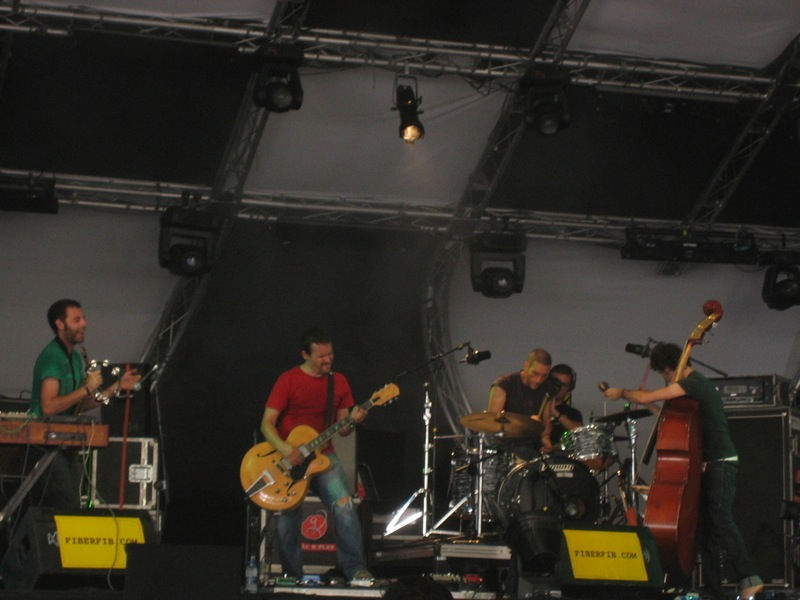 12twelve actuando en el Festival Internacional de Benicàssim (FIB) en 2006